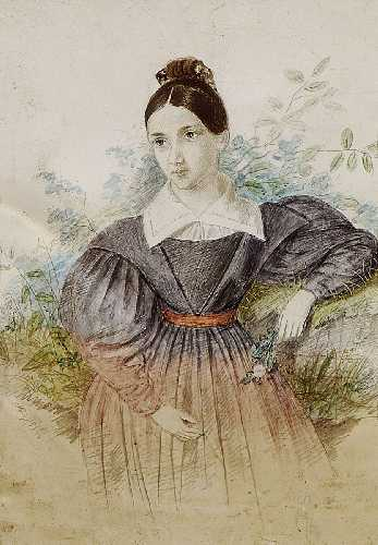 Portrait der Karoline Gräfin Guiot du Ponteil, Aquarell, 12,7 x 9,1 cm